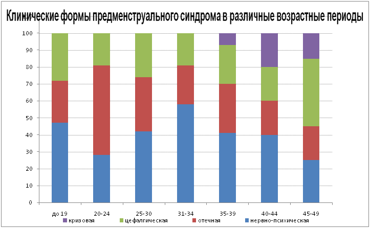 Клинические формы ПМС в различные возрастные периоды